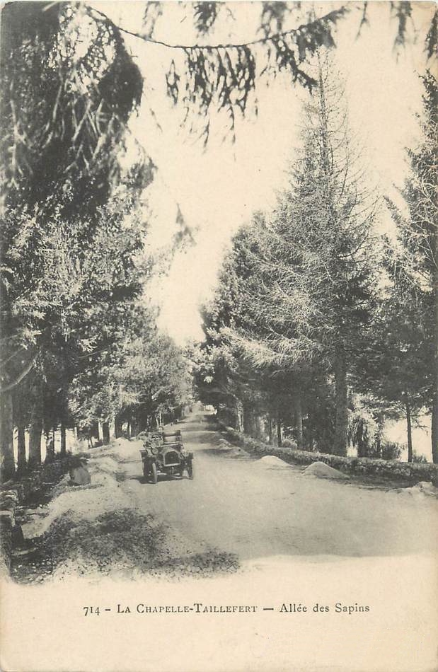 Carte postale